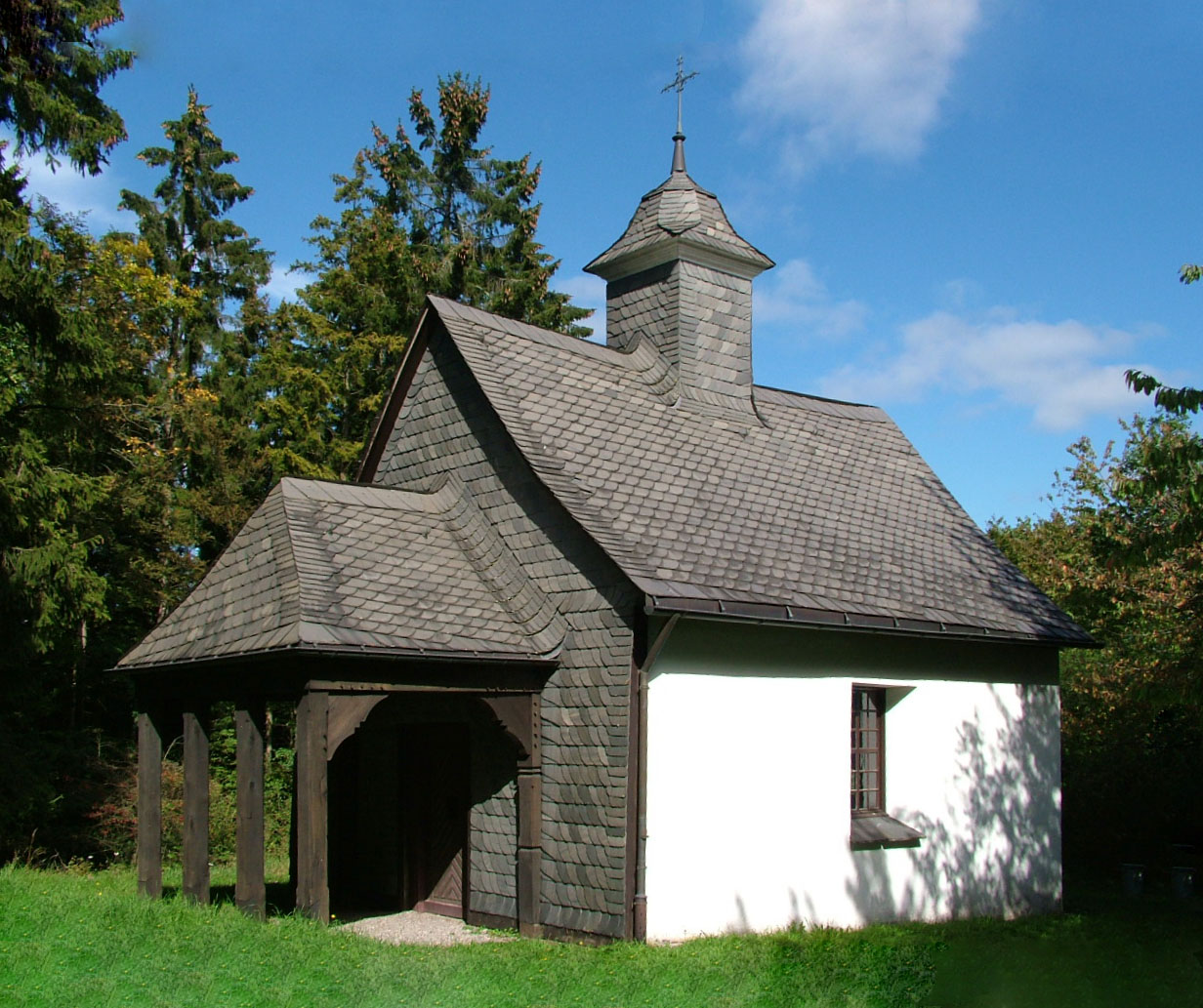 Hallenberg, Kreubergkapelle